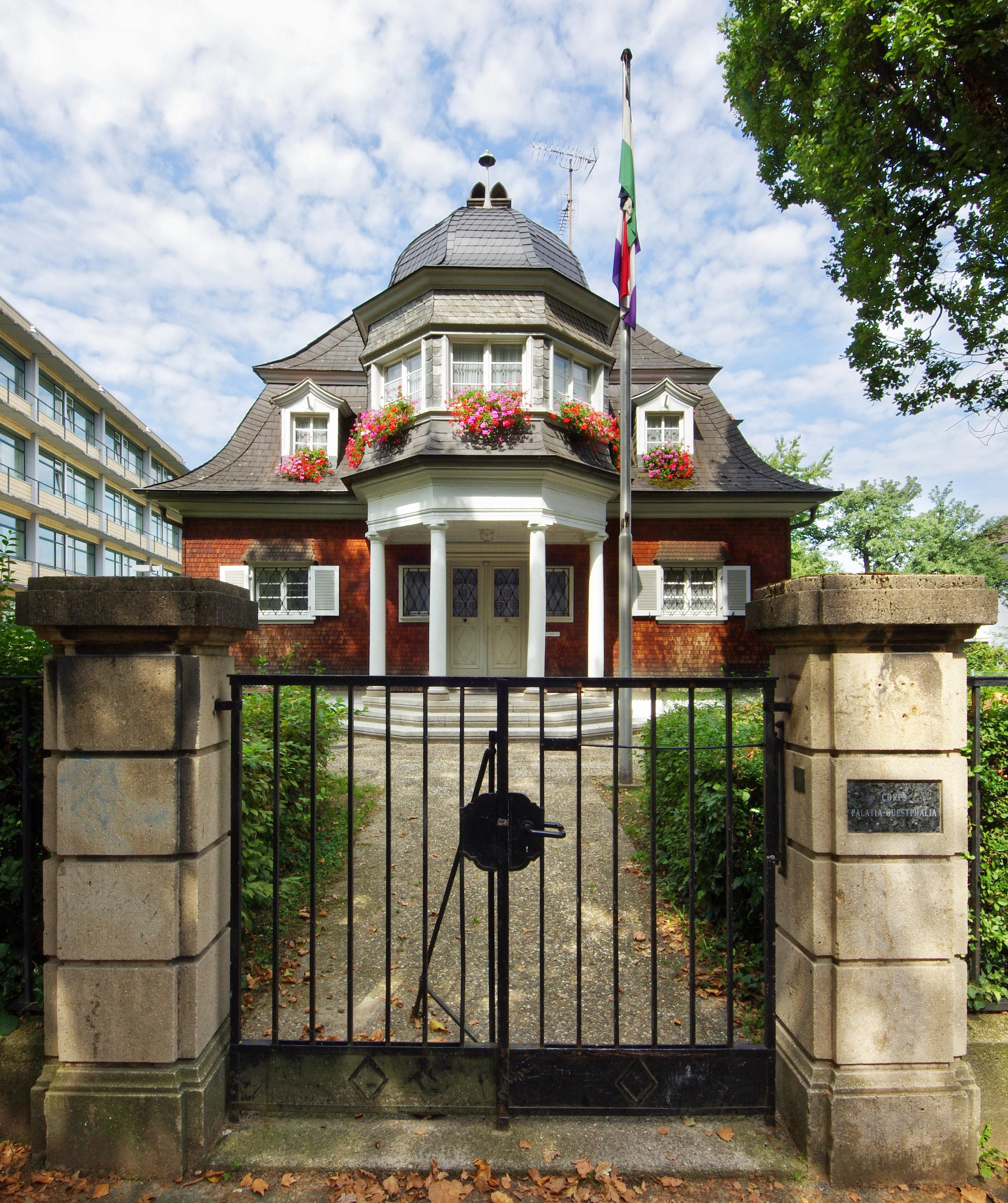 Das Haus des Corps Palatia-Guestphalia